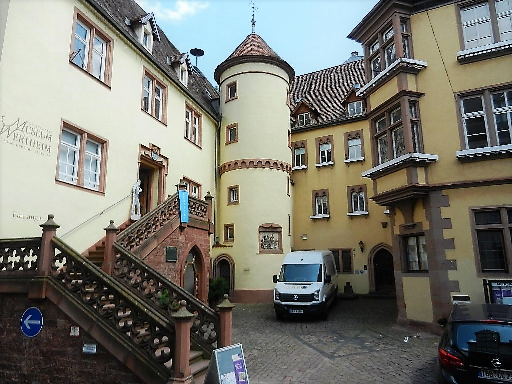 Altes Rathaus in Wertheim, heute Grafschaftsmuseum von Wertheim